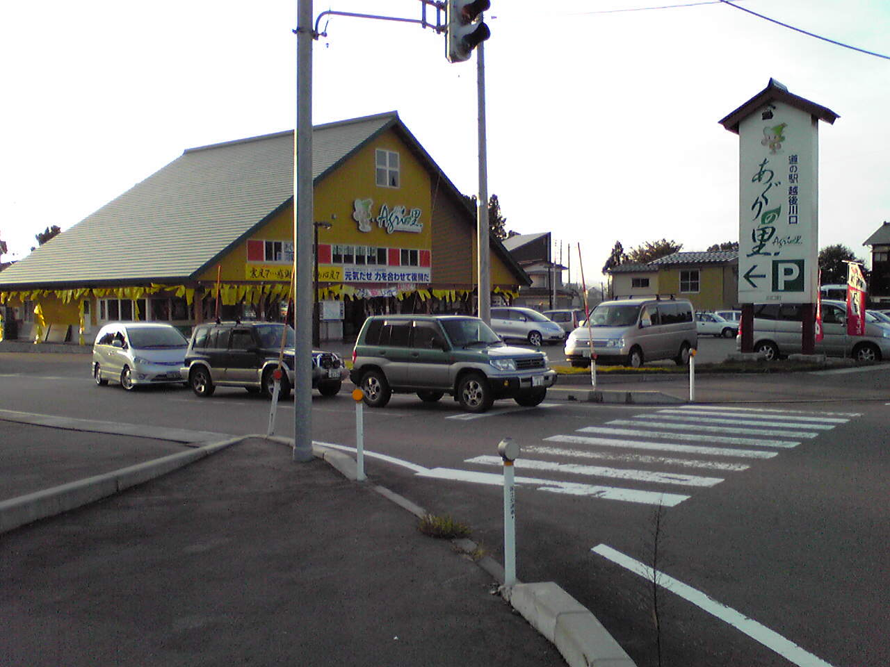 Echigokawaguchi, Roadside Station, Niigata, Japan.